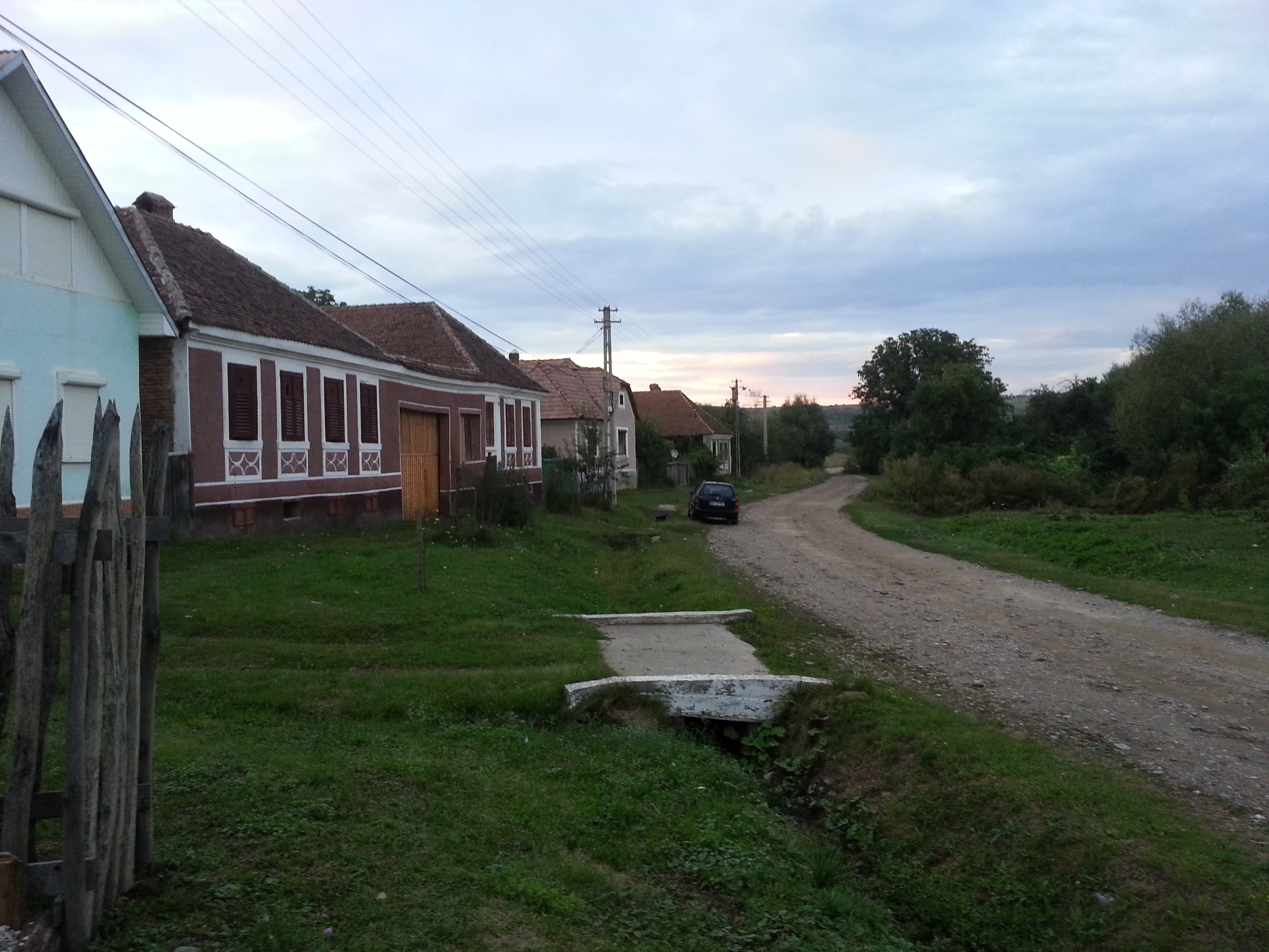 Eingang zum Dorf Schelken